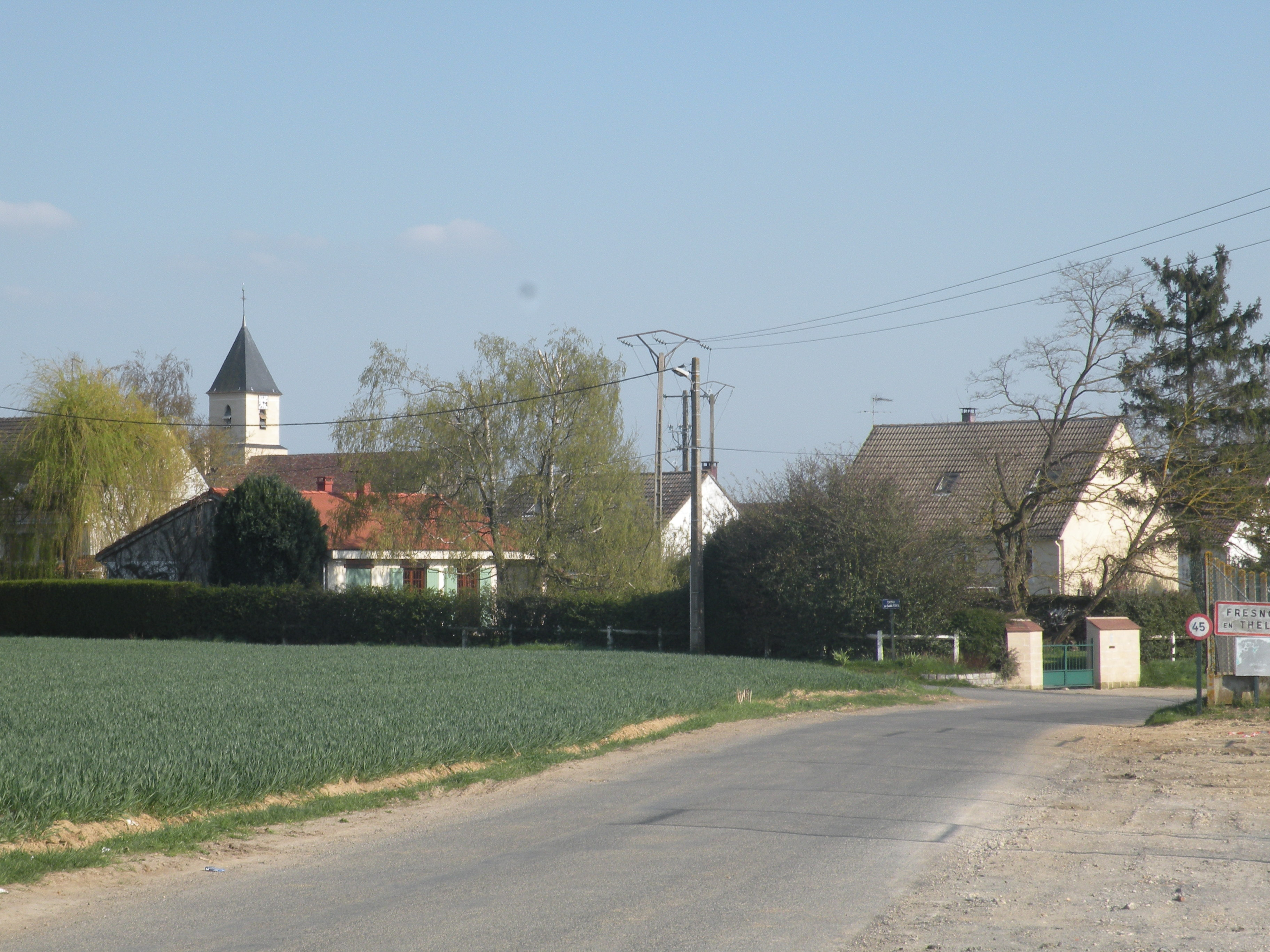 Fresnoy-en-Thelle vue de la ville